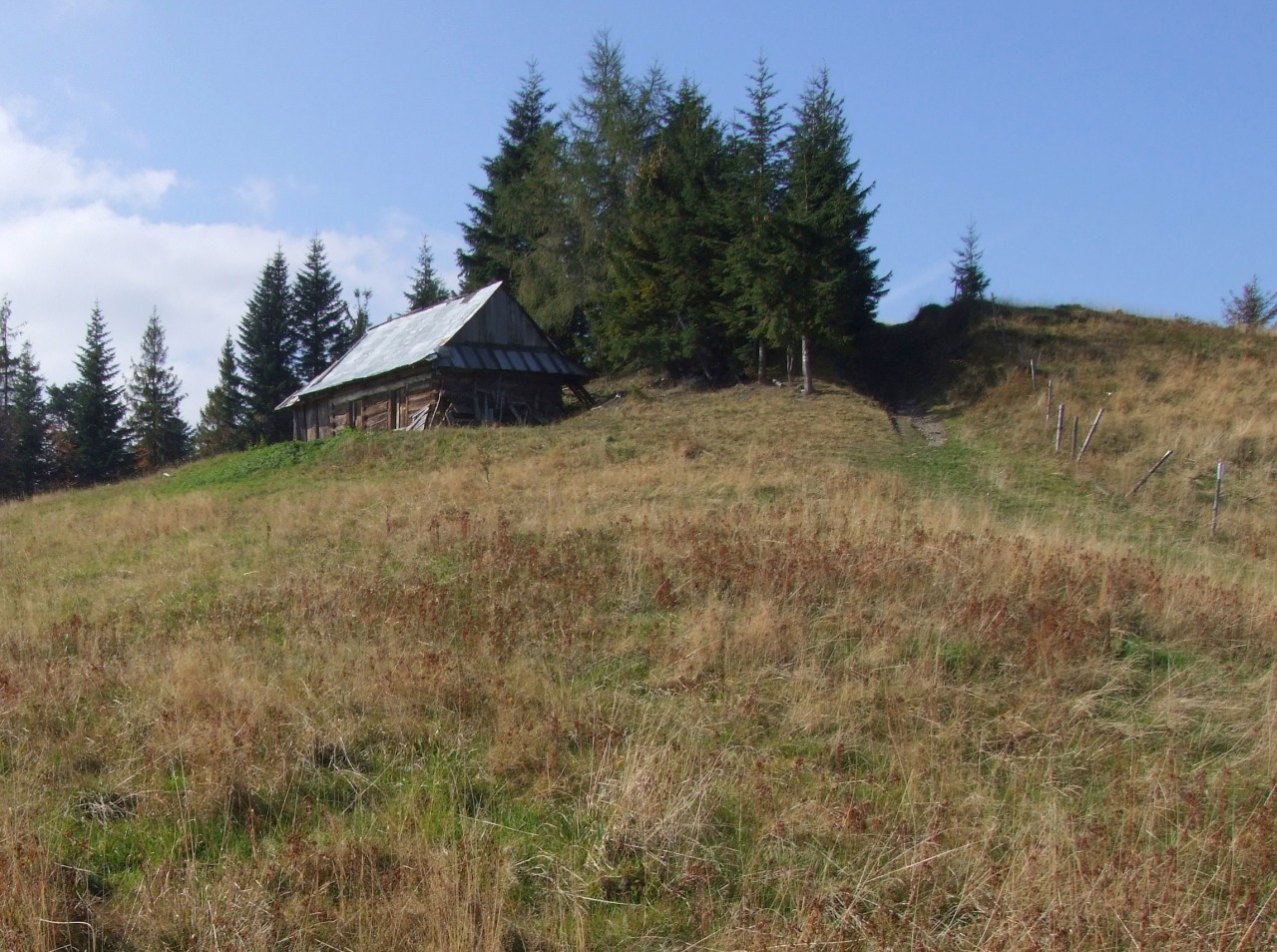 Stylowy szałas w Gorcach (polana Jaworzynka nad Przełęczą Przysłop)